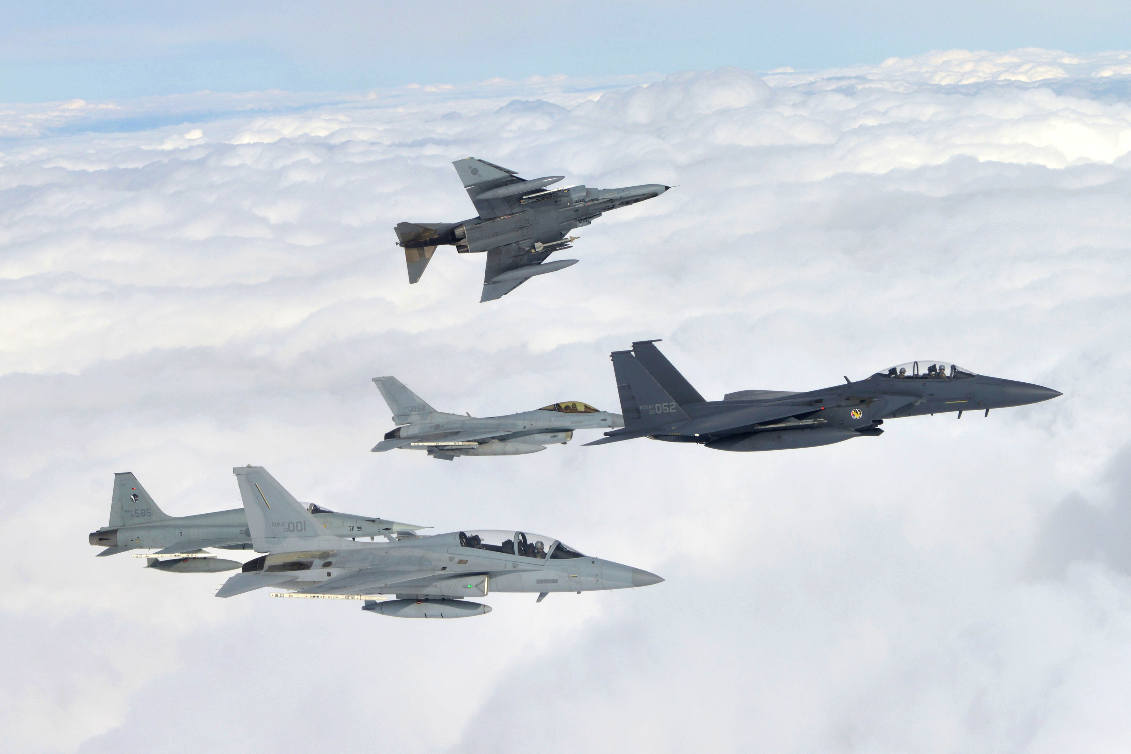 공군은 지난 2월 2일(월)부터 2주에 걸쳐 대규모 전역급 종합전투훈련인 '소링 이글(Soaring Eagle) 훈련'을 실시하고 있다. 사진은 2월 5일(목) 임무에 나선 공격 편대군 전투기들의 모습. FA-50과 F-5, F-15K, KF-16 편대 너머로 F-4E 전투기가 선회 기동을 하고 있다.